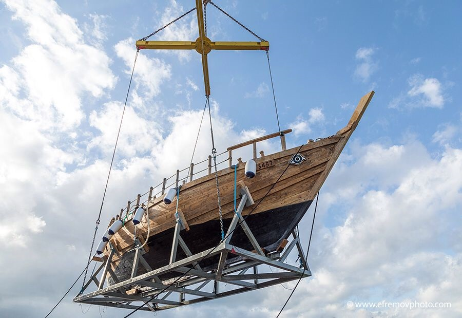 הרפליקה של הספינה העתיקה במספנות ישראל מונפת לקראת הורדתה למים